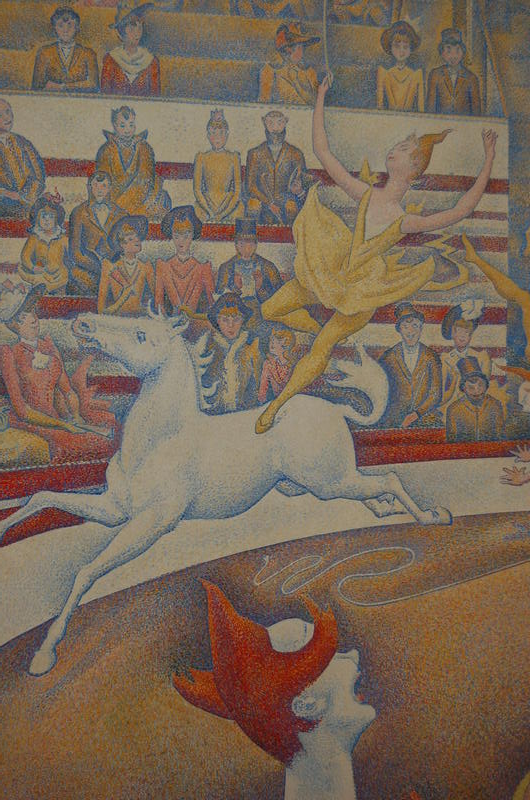 Détail du tableau "Le cirque" (1891) par Georges Seurat. Musée d'Orsay, Paris